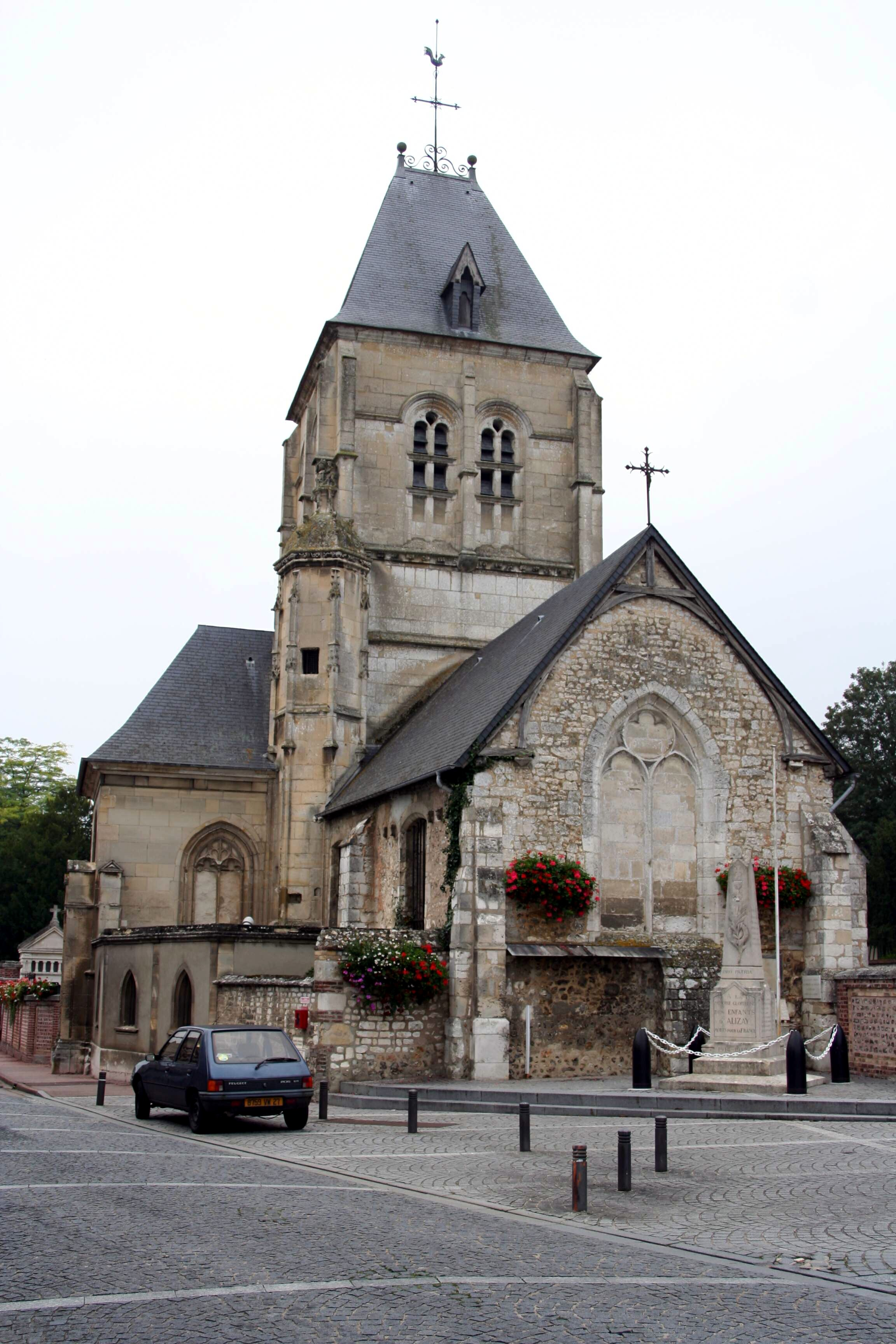 Église d'Alizay - Eure (France)